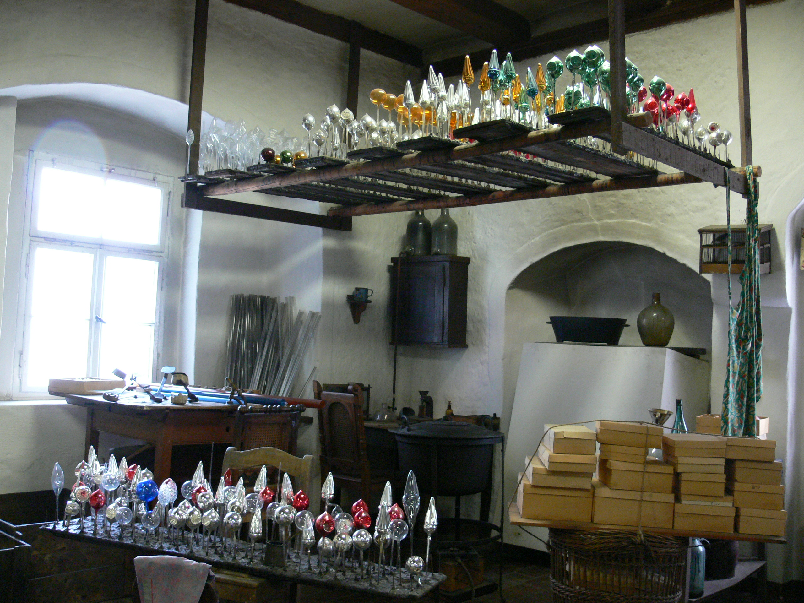 Wohn- und Arbeitsstube einer Glasbläserfamilie, Lauscha, um 1930. Museum für Thüringer Volkskunde, Erfurt